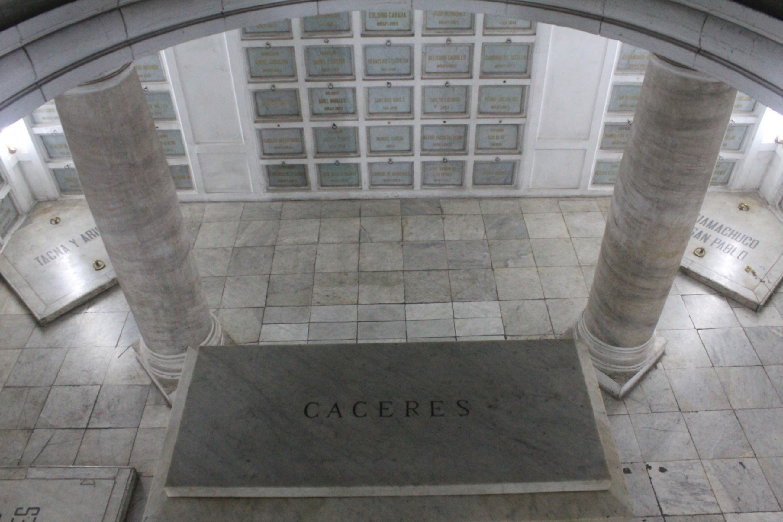 Cementerio Presbítero Maestro. Perú - Lima. Setiembre 2012